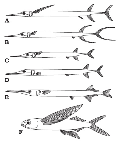 Morphological comparison of saurichthyids with extant needlefish and flying fish. A. Sinosaurichthys longipectoralis. B. Sinosaurichthys longimedialis. C. Sinosaurichthys minuta. D. Saurichthys dawaziensis from Middle Triassic of Dawazi Section, Luoping, Yunnan, China (based on Wu et al. 2009). E. Atlantic needlefish Strongylura marina (Family Belonidae). F. Bluntnose flyingfish Prognichthys gibbifrons (Family Exocoetidae). E and F redrawed from images at that were originally from Cervigón et al. (1992).